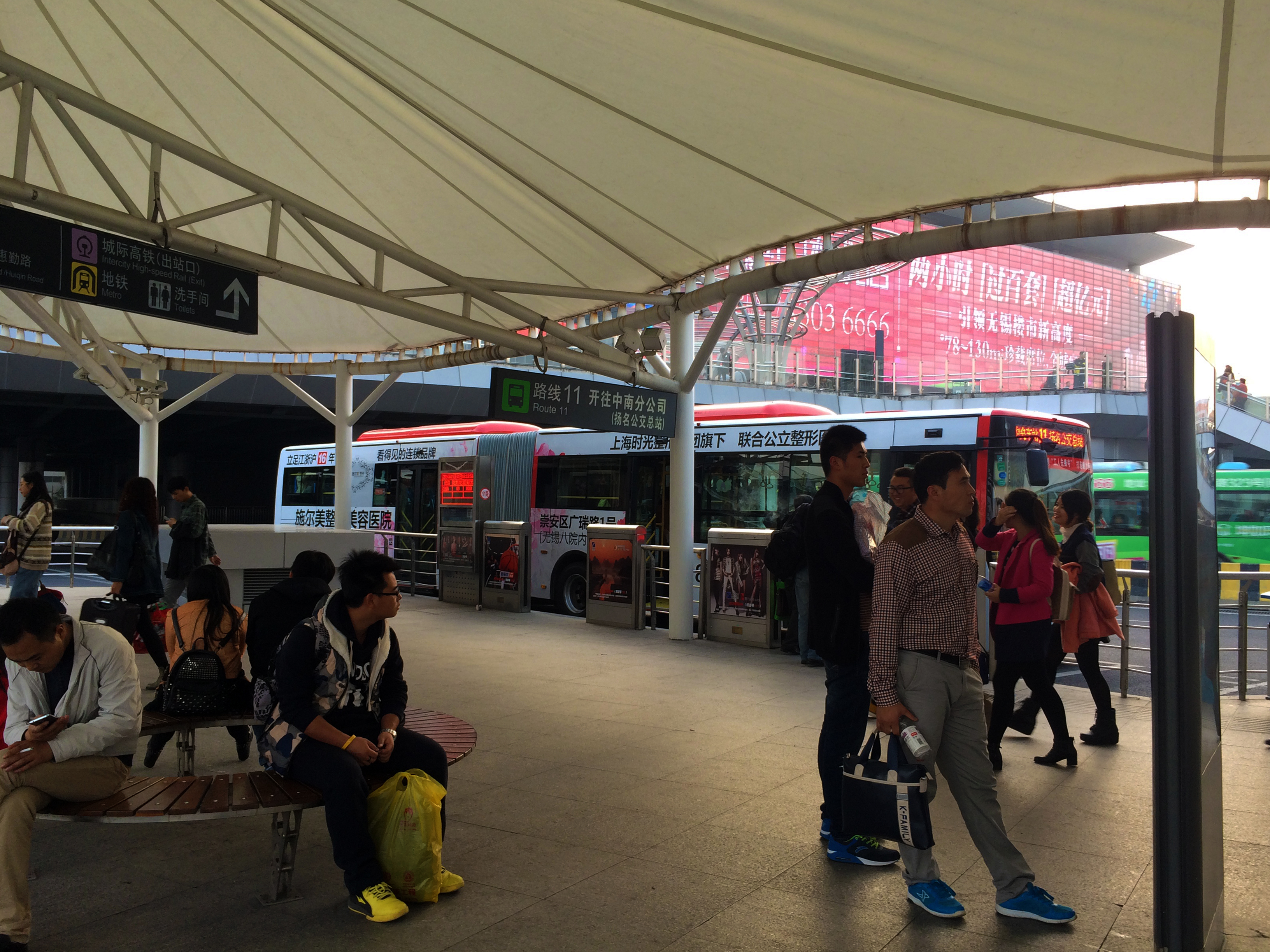 無錫市的一個智能化公共汽車站臺。因全面采用了物聯網技術，在無錫乘坐公共汽車可通過智能站牌、短信、手機客戶端等工具實現對公共汽車的實時定位，而公交公司也因此能夠管控公交車的路線、速度、到站報音等線路運營過程。此一技術目前已逐漸覆蓋中國各大城市。